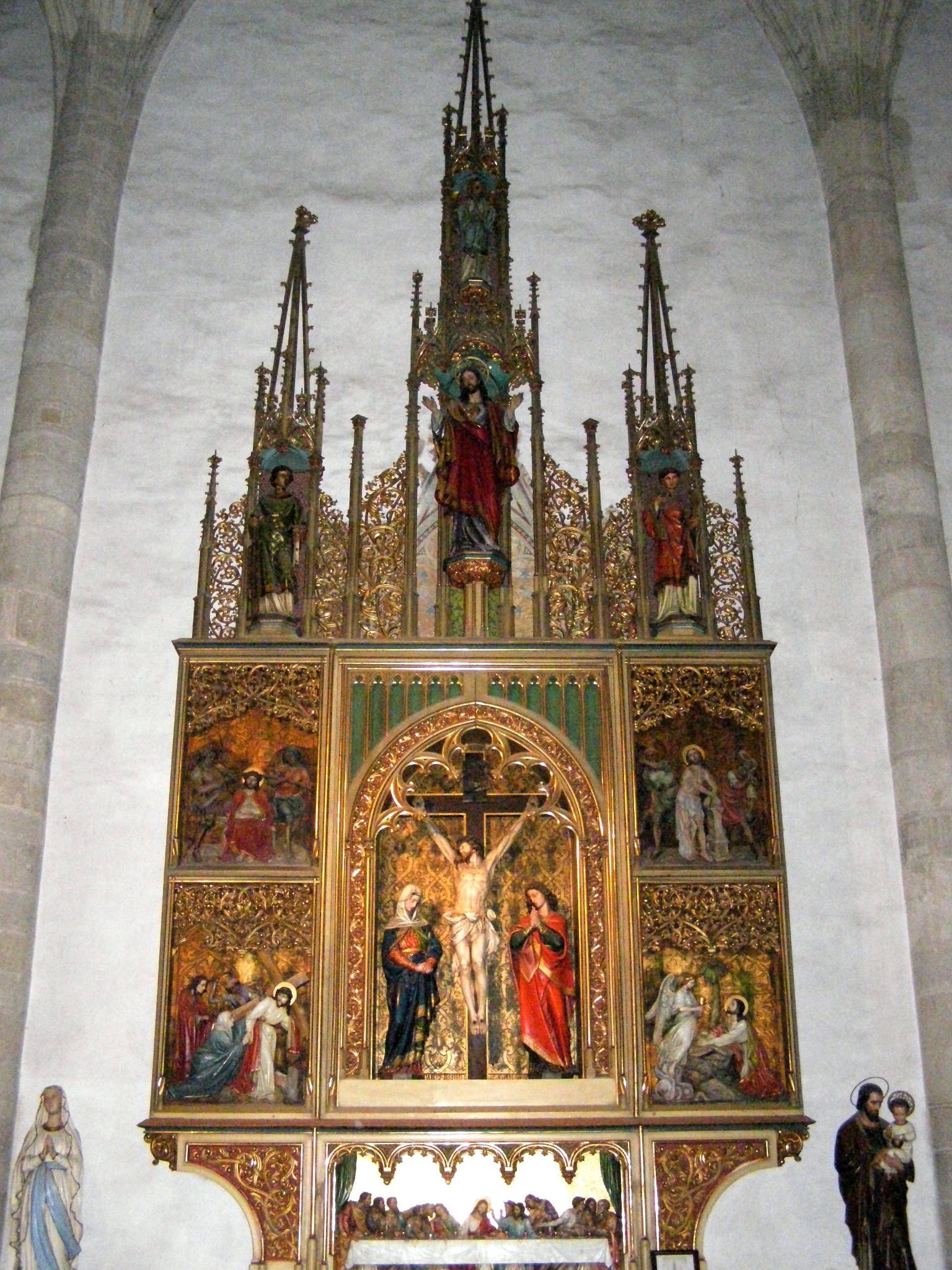 Oltár kalvárie v severnej lodi - celkový pohľad